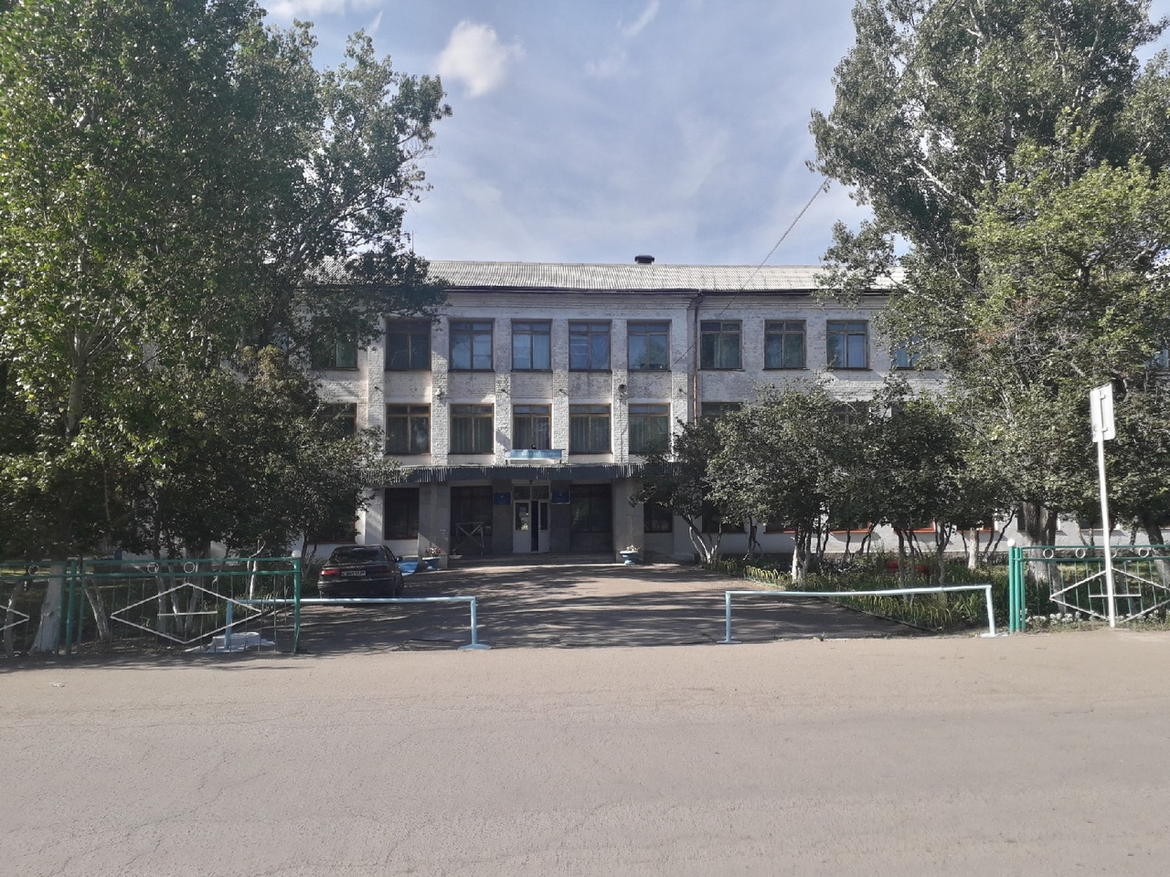 вид на школу 2019